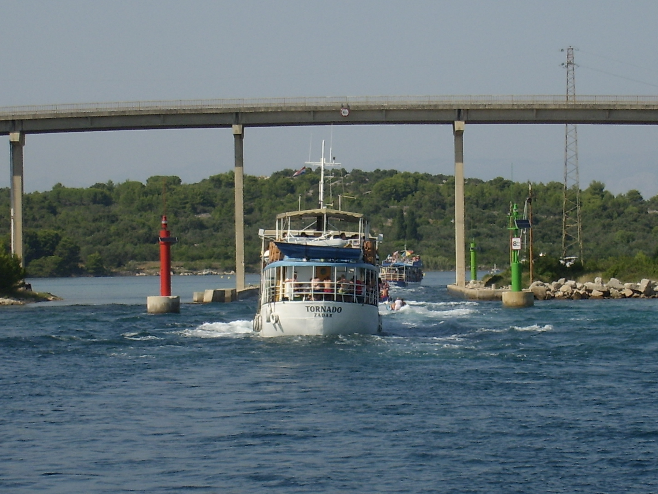 Durchgang Meeresenge Ždrelac